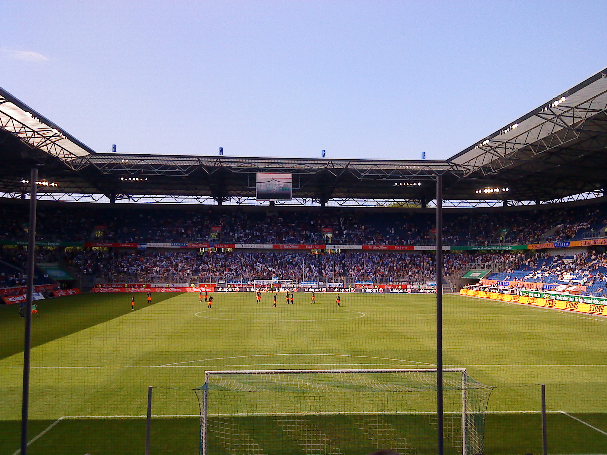 Blick auf die Nordkurve der MSV-Arena beim Bundesligaspiel zwischen dem MSV Duisburg und VfL Osnabrück.